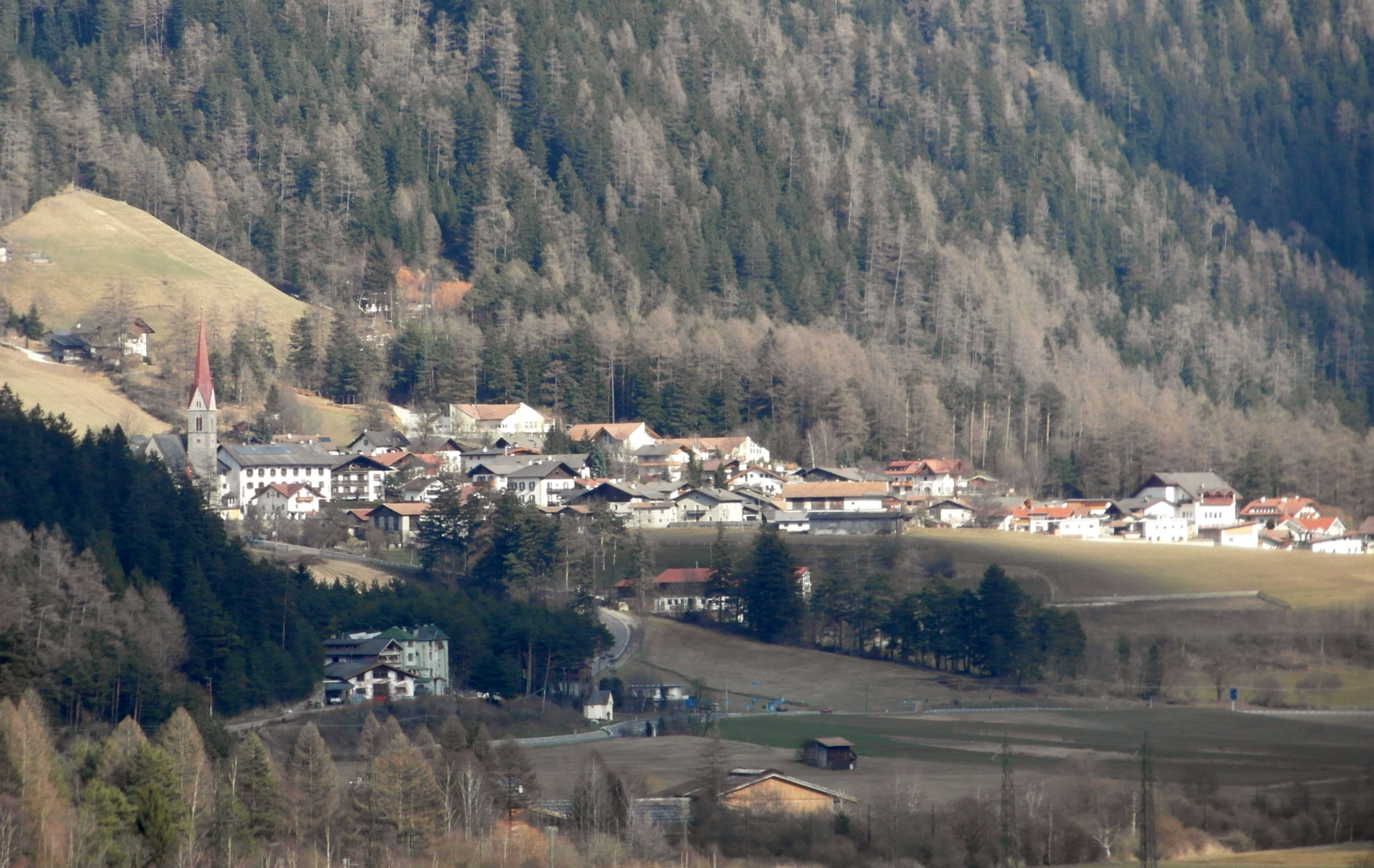 Panorama di Campo di Trens